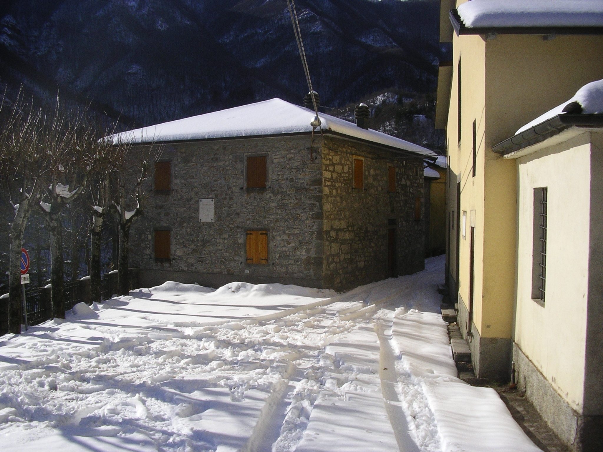 Piazzetta di Casa Calistri, frazione del Comune di Granaglione (BO)